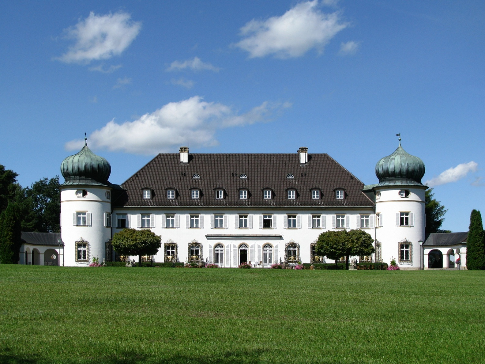 Schloss Höhenried, Südansicht